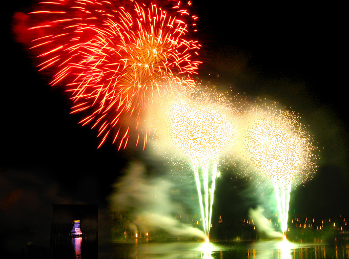 Finale2